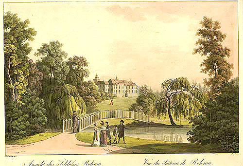 Ansicht des Schlosses Rohrau. Umrissradierung, koloriert, 30,5x43 cm.